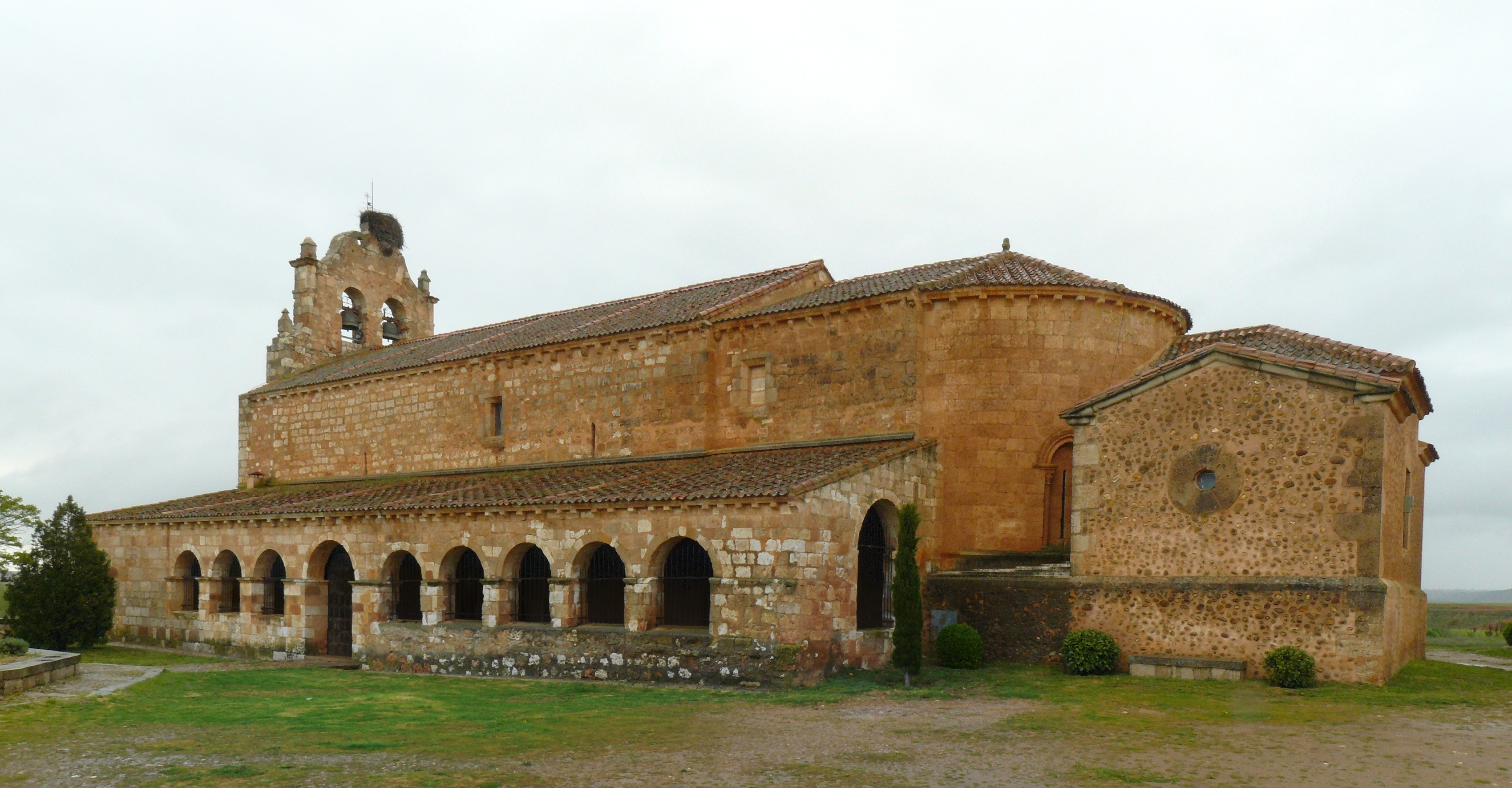 Iglesia de La Natividad de Santa María de Riaza.